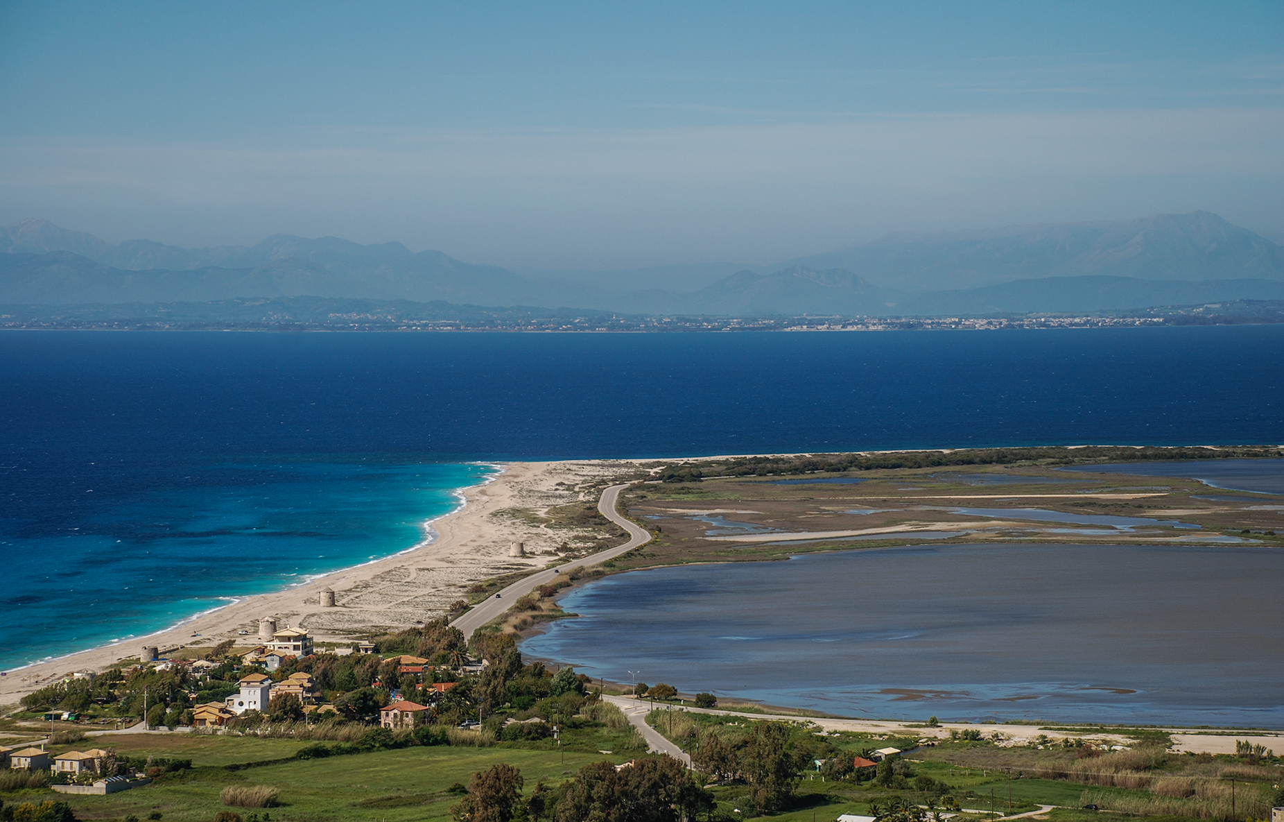 ΛΙΜΝΟΘΑΛΑΣΣΕΣ ΣΤΕΝΩΝ ΛΕΥΚΑΔΑΣ This is a photography of Natura 2000 protected area with ID GR2240001